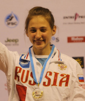 Алина Гайдамакина